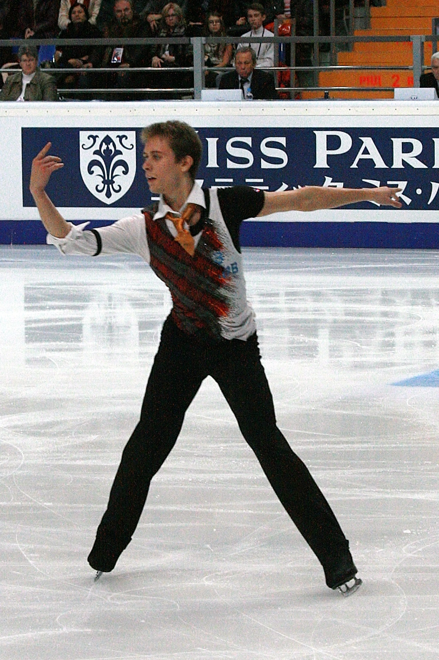 Михал Бржезина (Чехия) на Кубке Ростелекома 2012. Произвольная программа.